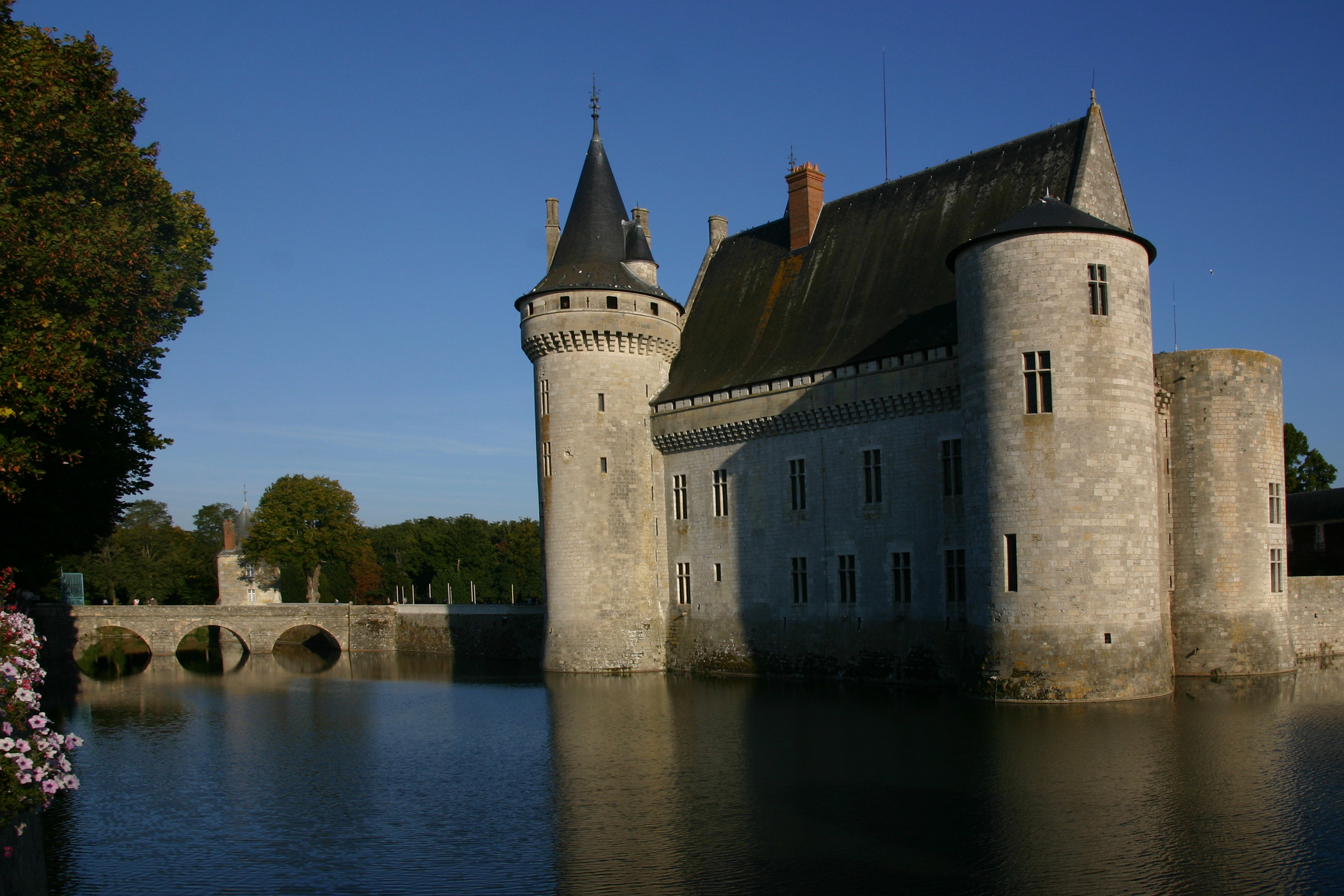 Schloss Sully-sur-Loire